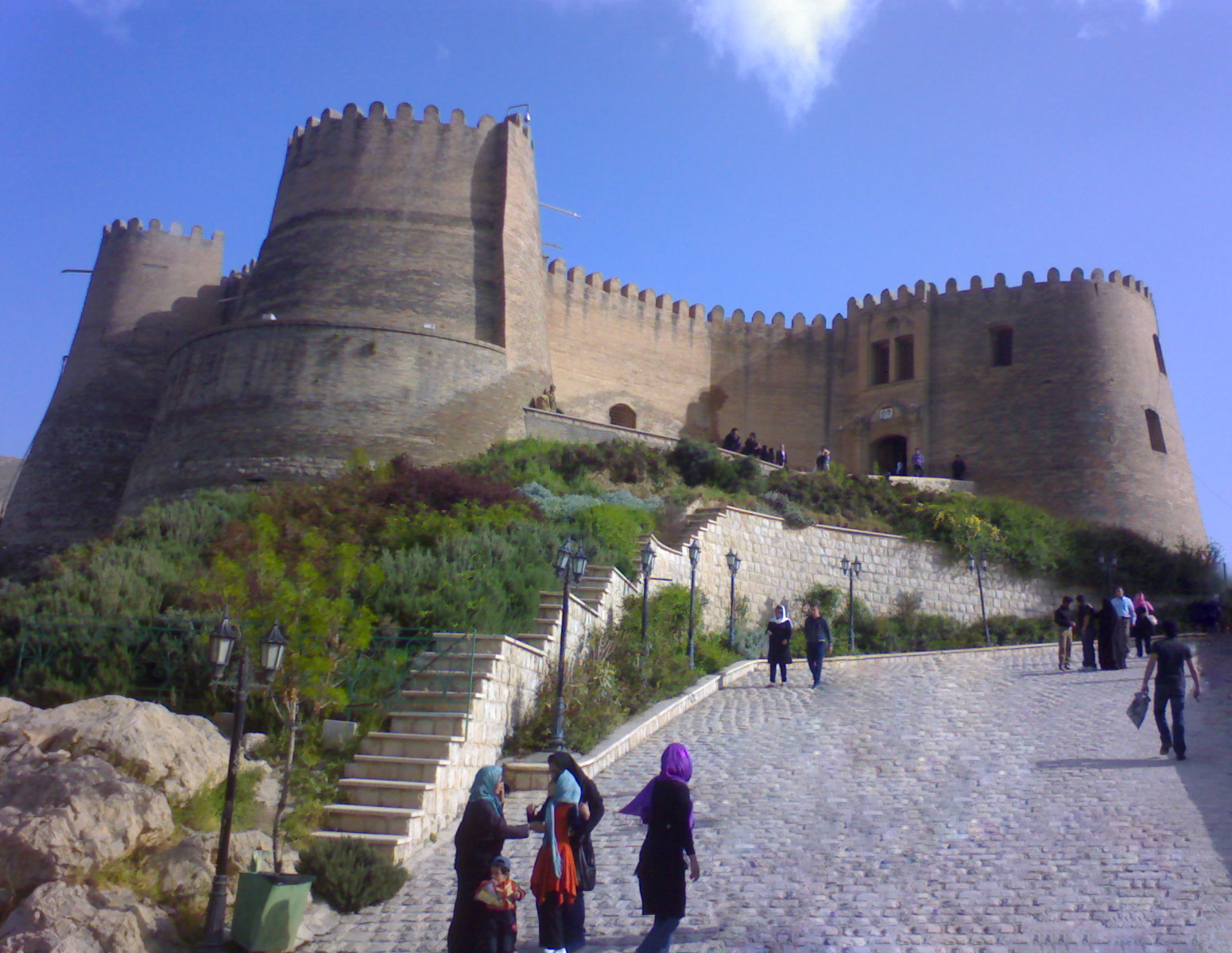 قلعه فلک الافلاک در مرکز شهر خرم آباد